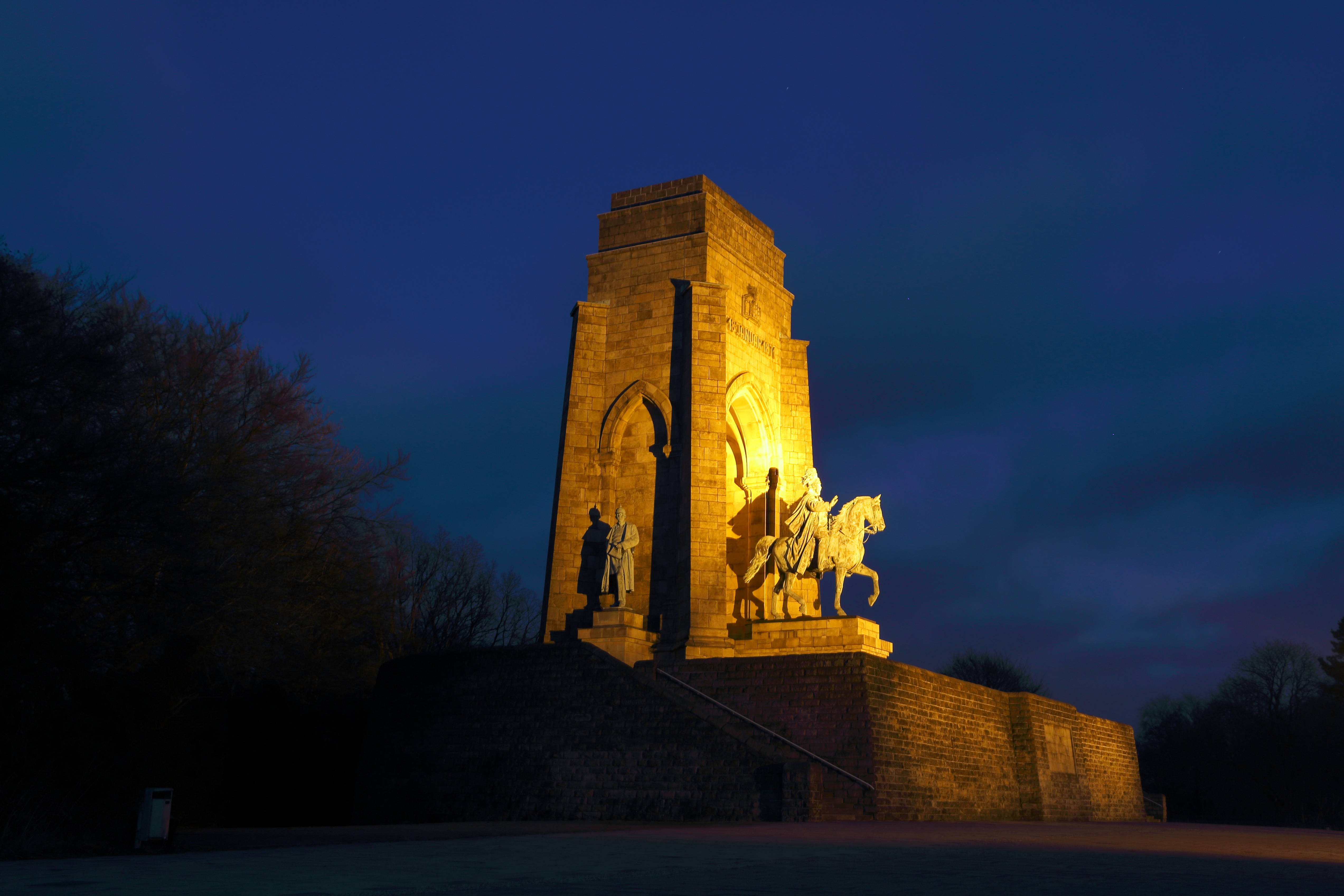 Kaiser-Wilhelm-Denkmal, Dortmund-Syburg This is a photograph of an architectural monument. 0019